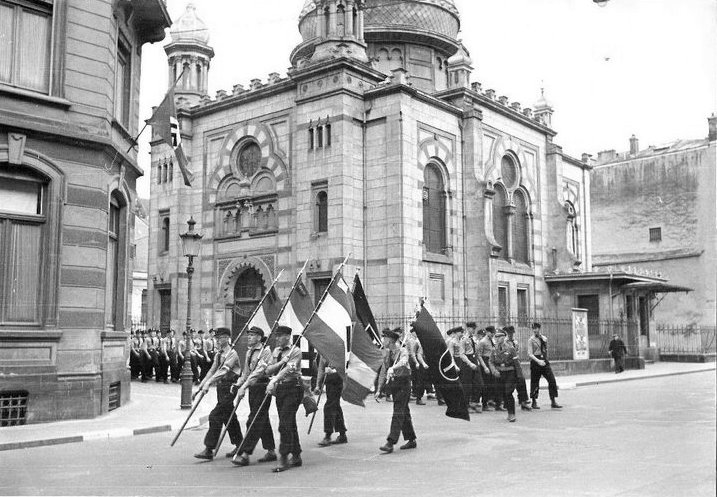 Nazidefilee vrun der aler Synagog.